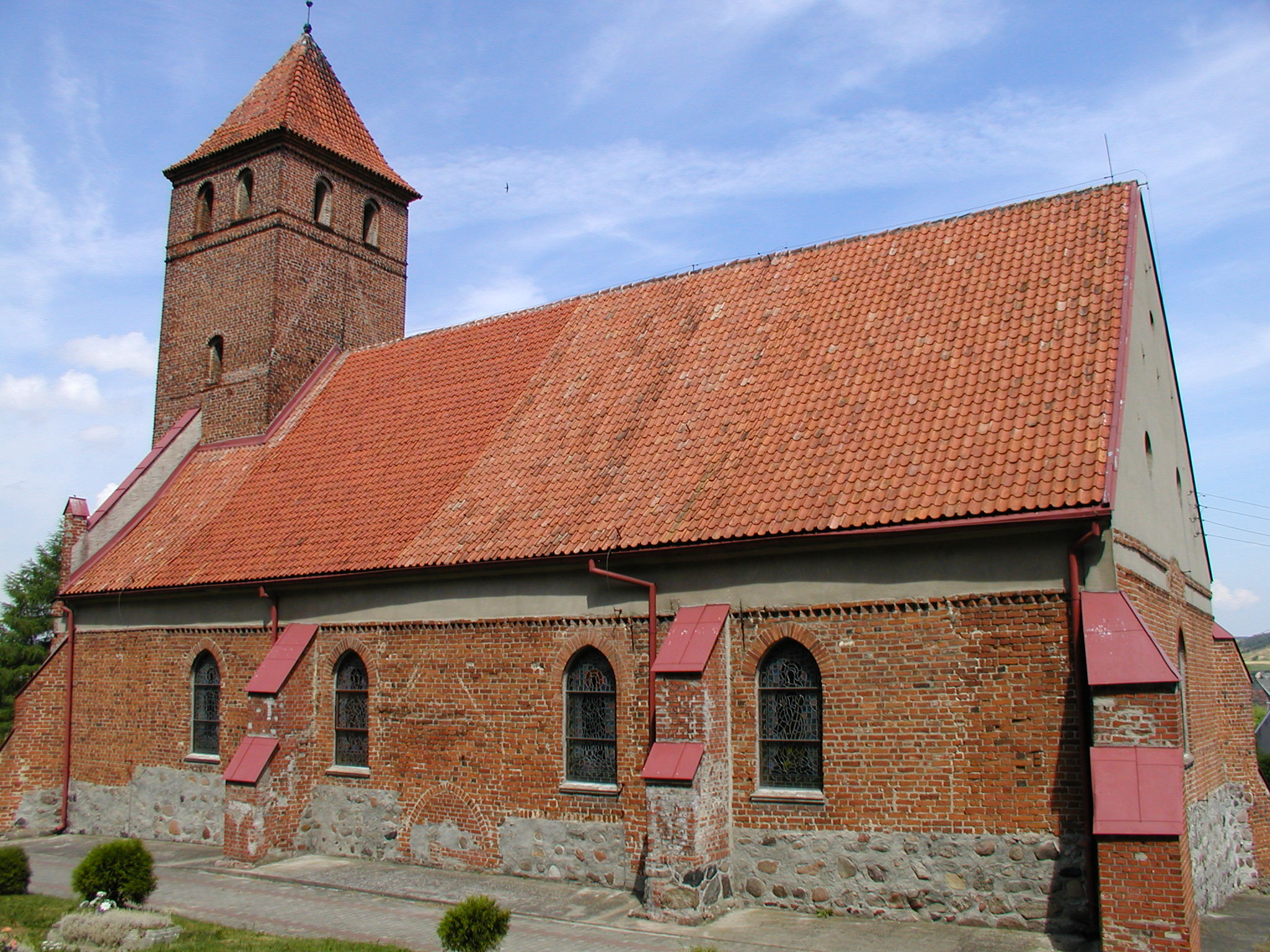 kościół parafialny pw. św. Marii Magdaleny wraz z wyposażeniem wnętrza Kurzętnik, Kurzętnik